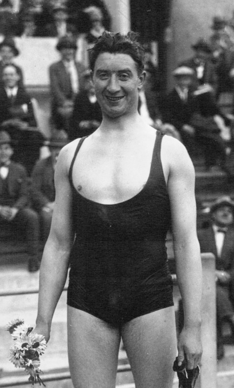 Tourelles, championnats de France de natation : Padou (portrait) : [photographie de presse] / Agence Meurisse